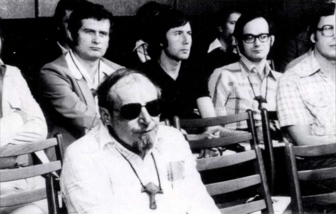 Zám Tibor 1929–1984) író, tanár, szociográfus a Fiatal Írók Találkozóján, Lakitelken